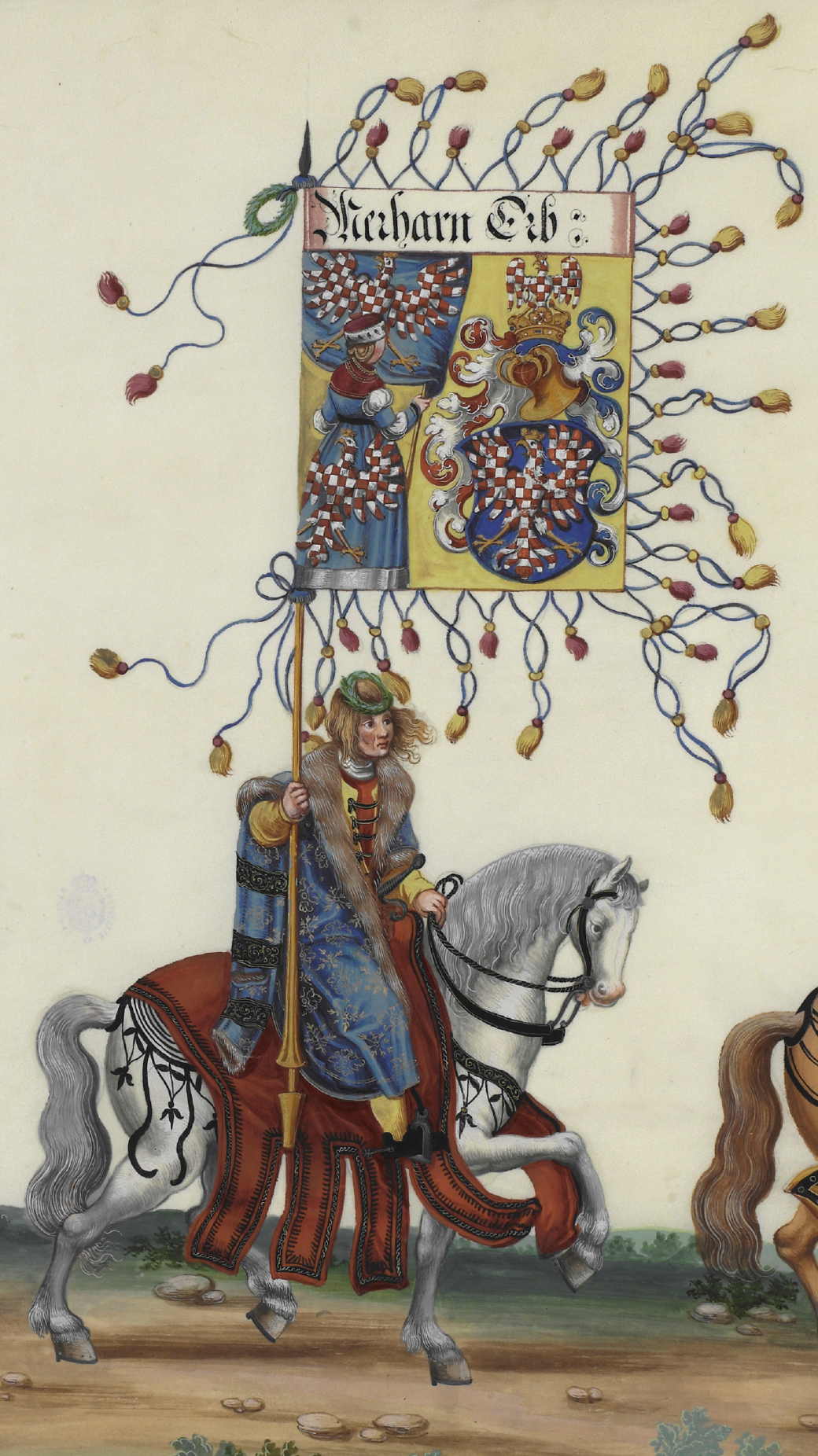 Rukopisná kresba se liší od německého vydání, což jsou tištěné dřevořezy. V letech 1777, 1796 a 1883-1884 byl triumfální pochod Maxmiliána I. Habsburského tiskem vydán znovu. Ženy, jako „strážkyně štítů“ apod. se v |renesanční ilustraci objevují často i jinde (např. na dřevořezech Albrechta Dürera). Zajímavé je, že žena praporečnice na praporu jezdce má i knížecí čepici, tedy, že je to v podstatě „markraběnka“. Zajímavé je i užití červeno-stříbrných a modro-stříbrných přikryvadel, tedy všech tinktur štítu znaku. To nebývá často, většinou jsou přikryvadla moravského markraběte důsledně (oficiálně) po obou stranách jen červeno-stříbrná, stejně jako u znaku českého krále, ačkoli existují rozmanité doklady barevného provedení přikryvadel dokládající různé povědomí tvůrců o podobě úplného znaku moravského markraběte. Zlaté/žluté střapce jsou nejčastější (textilní) dekorací – viz u církevních korouhví, ale i jako dekorace textilu (svazování těžkých závěsů pomocí zlatých šňůr se střapci, zdobení dobových reprezentačních oděvů apod.). Ke zlaté se hodí červená (královská, majestátní) nebo modrá, které již je na praporu dost. Jsou použity červené střapce, vedle (nejčastějších) dekorativních zlatých/žlutých; feflíky (praporové šňůry a střapce). Znaky zemí s dodatkem "Erb:" (anglický, český, moravský, portugalský atd.) vyplývají z dědických a příbuzenských nároků Habsburků té doby (podobně jako císařem též užívaná uherská titulatura, ač fakticky vládl Matyáš Korvín a pak Jagelonci.